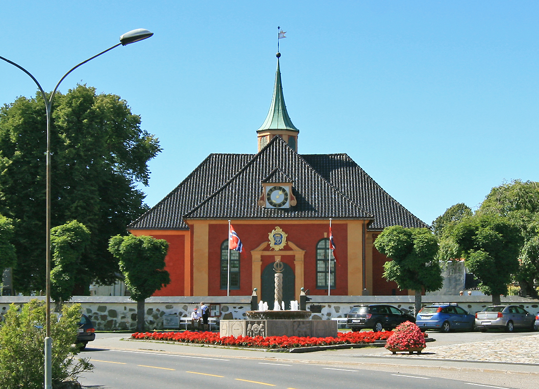 Fredriksvern kirke. Stavern, Norway.